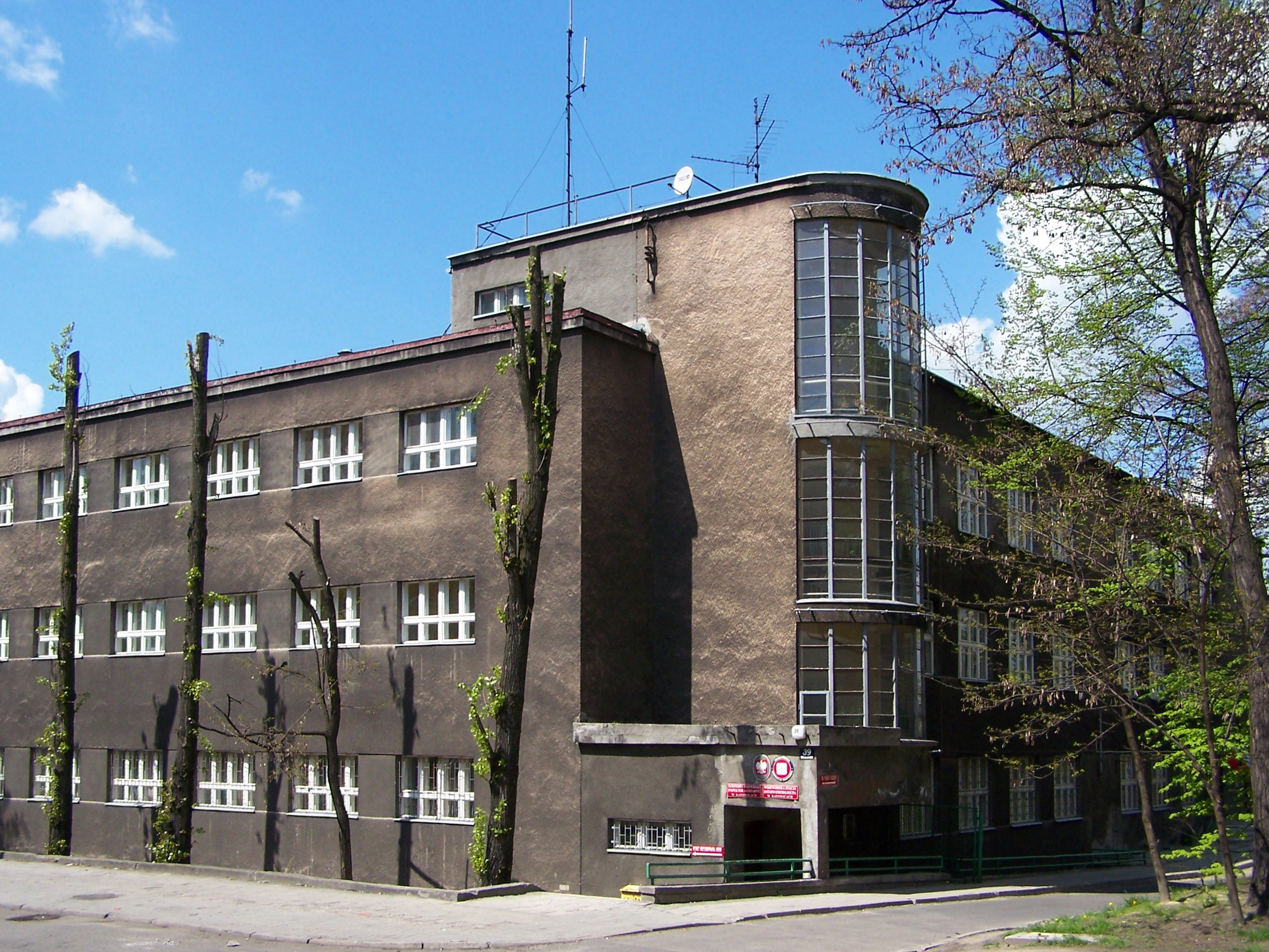 Budynek przychodni (ZHSZ) przy ul. Raciborskiej w Katowicach. Przykład architektury modernistycznej w Katowicach.